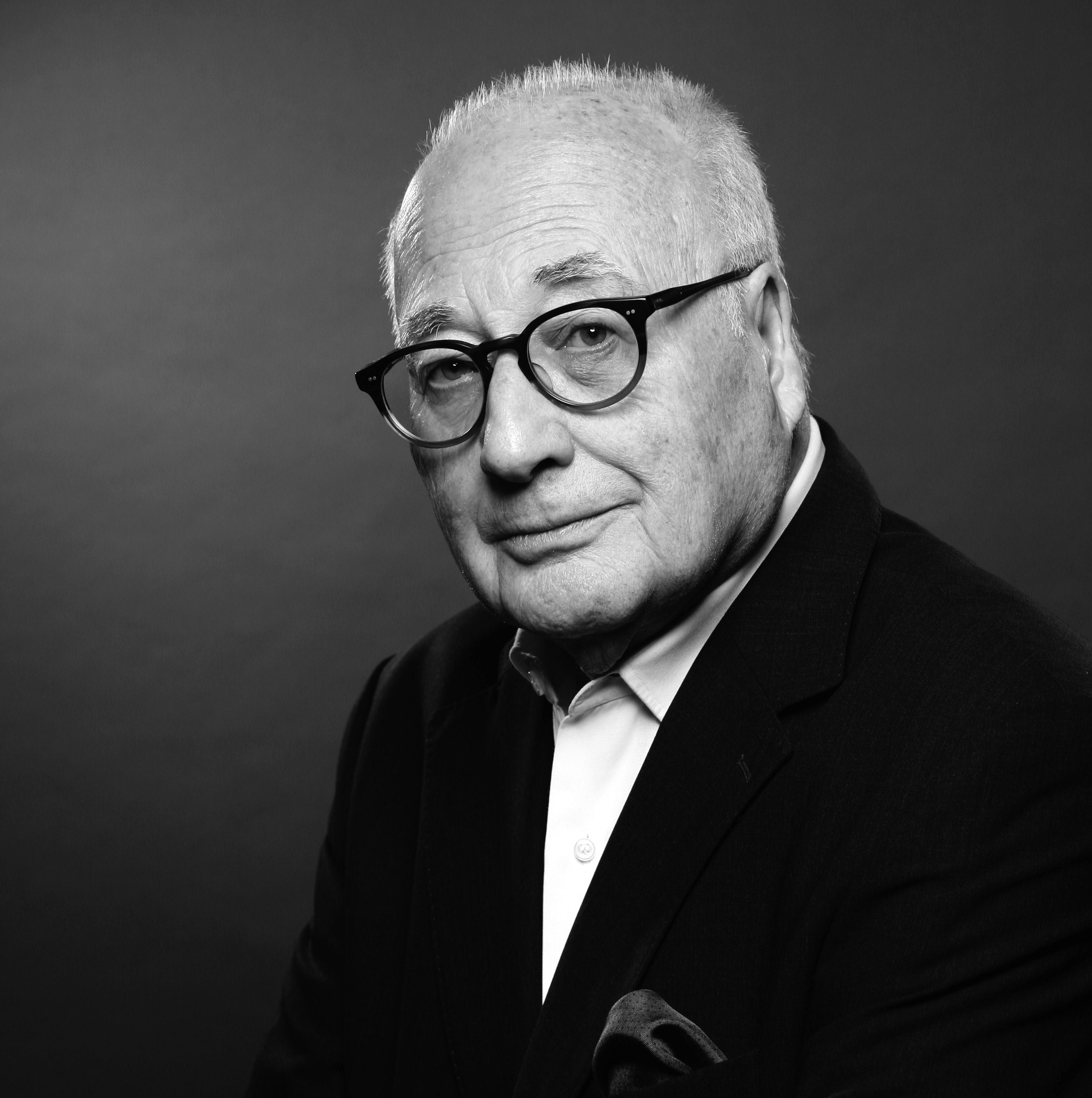 Portrait von Claus A. Froh im Jahr 2014